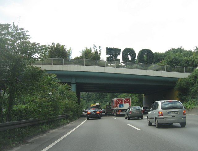 Starker Verkehr (A3) und Zoo-Terrassen